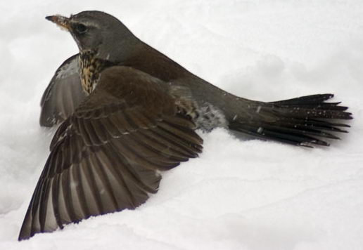 Turdus pilaris Photo taken in Rumia, Poland by Adam Kumiszcza.